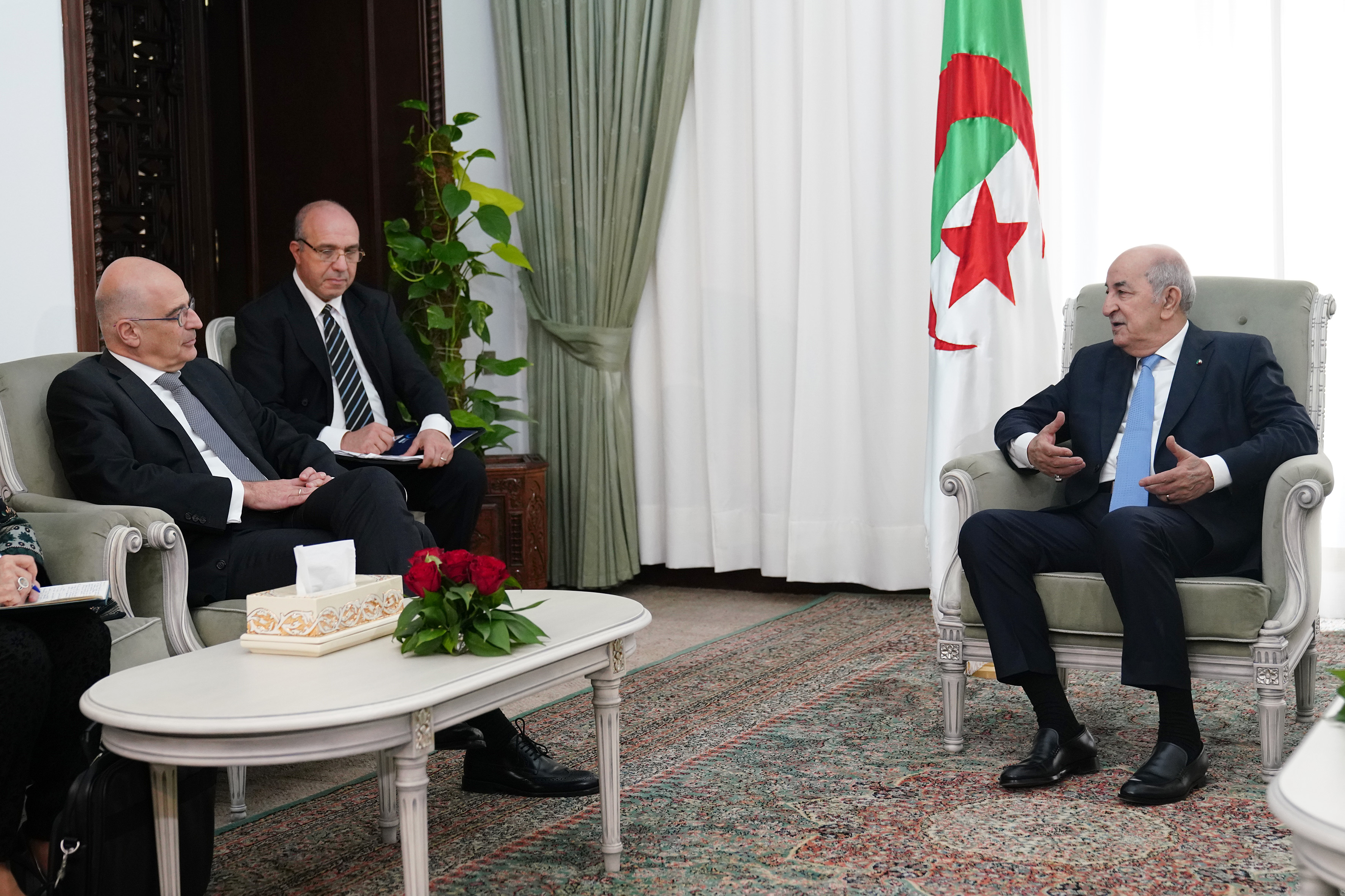 لقاء رئيس الجزائر عبد المجيد تبون مع وزير الخارجية اليوناني نيكوس دندياس 13 فبراير 2020